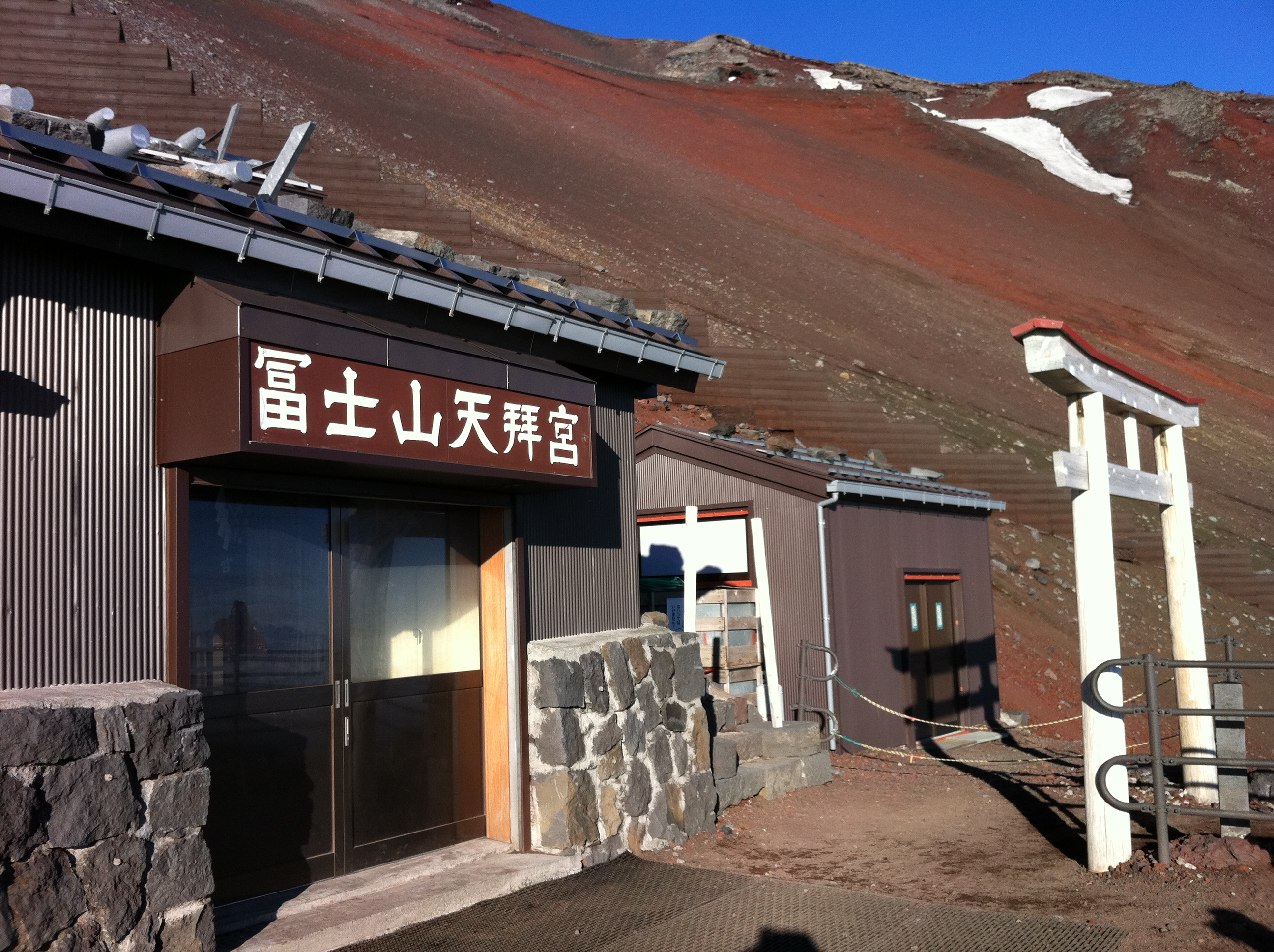 富士山にある扶桑教の富士山天拝宮